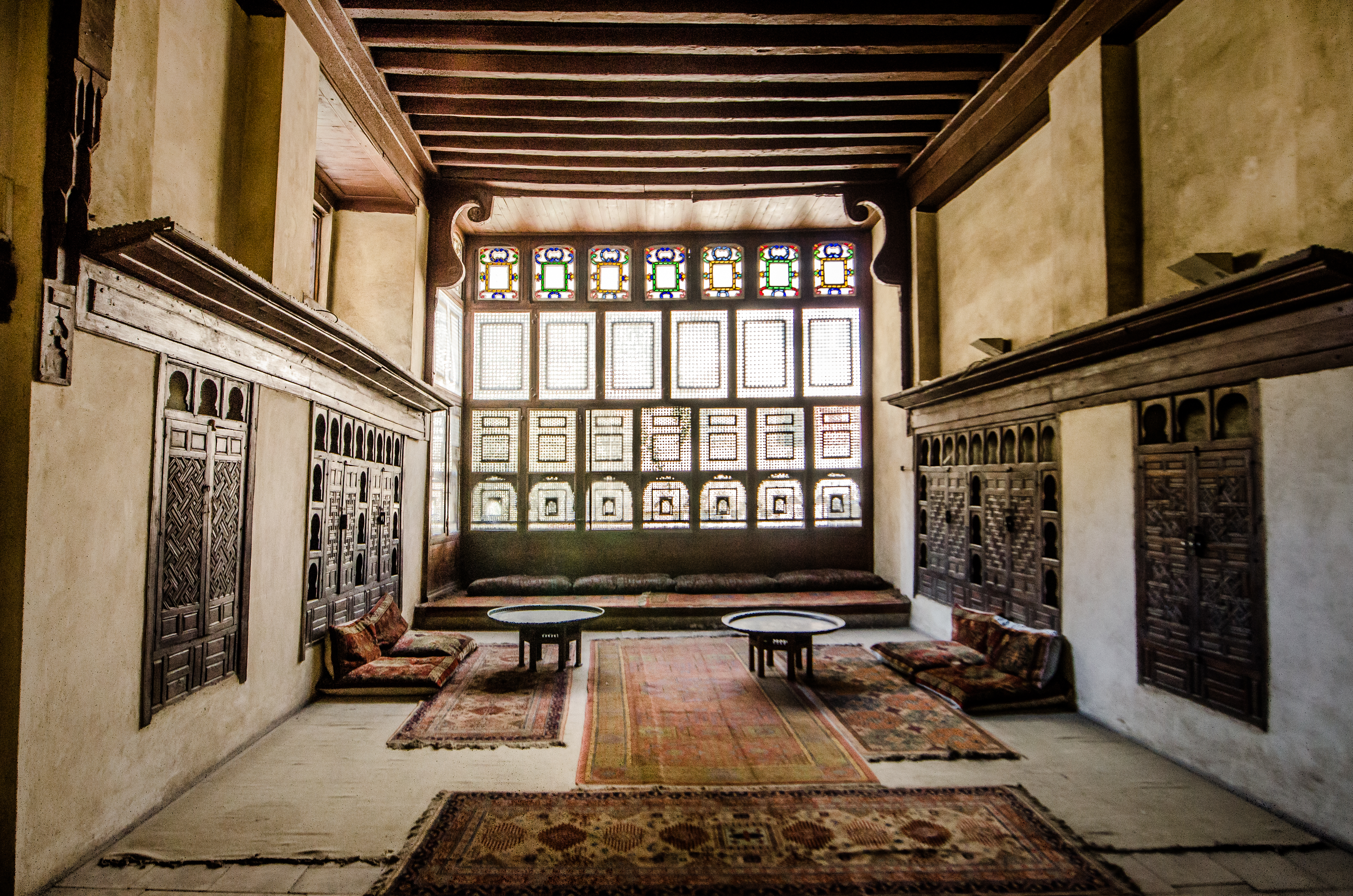 المعالم الاثرية من بيت السيحيمي 10